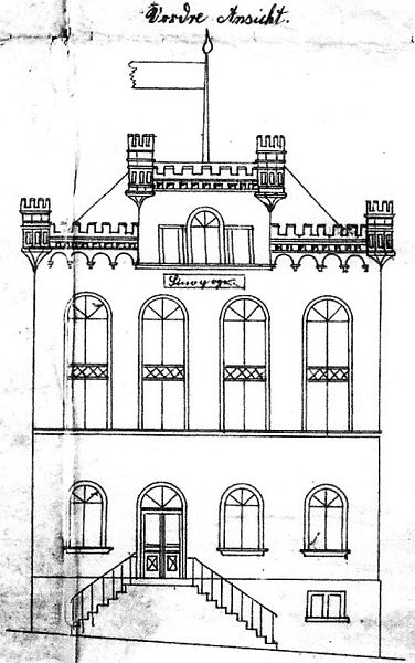 Plan der Synagoge in Oberwesel